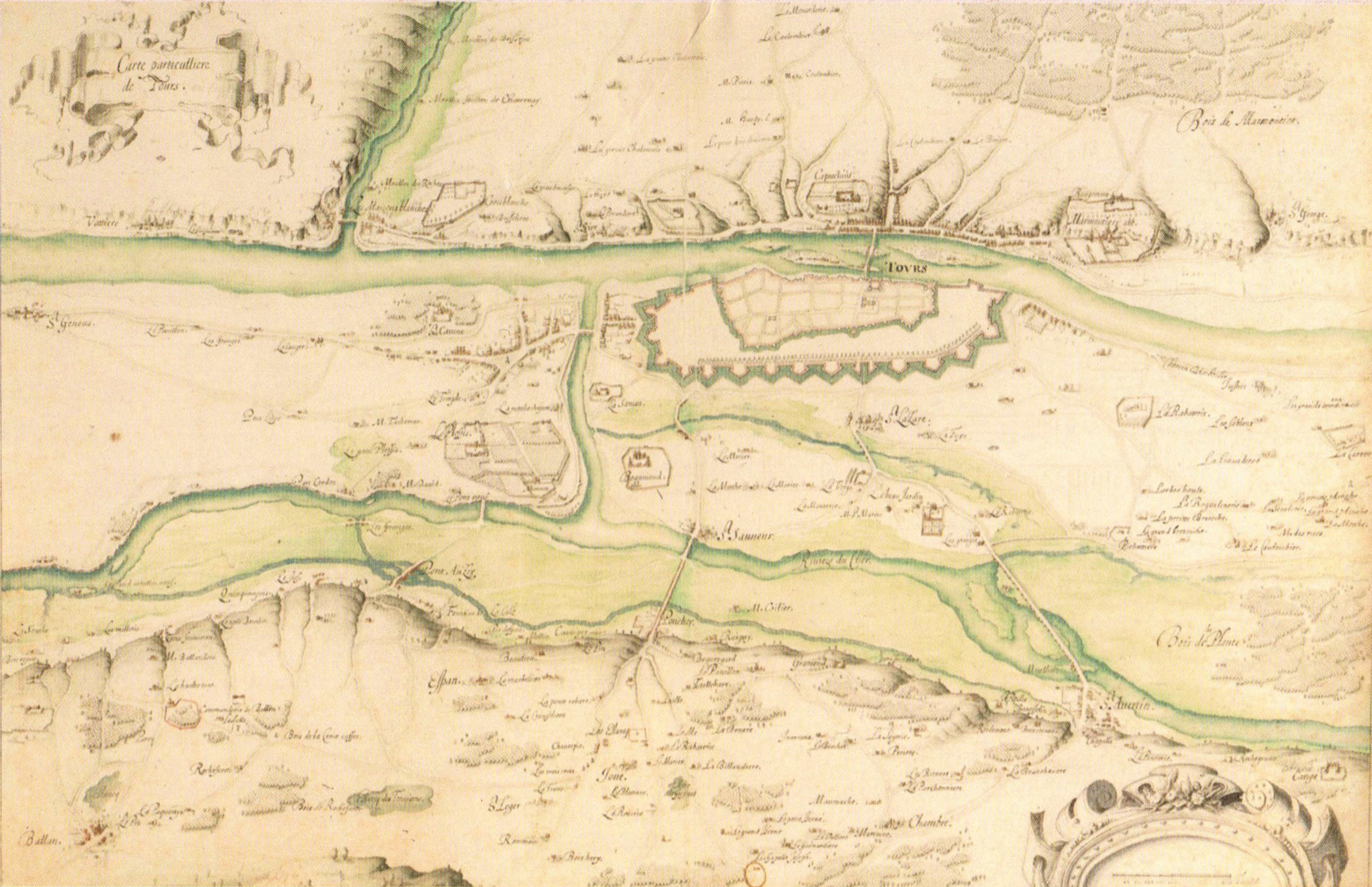 Carte particulière de Tours avec relief faite par R. Siette (juillet de 1619) (BnF) - Publiée également dans H. Galinié, Tours, antique et médiéval, 2007, 108, Fig. 17, p. 312